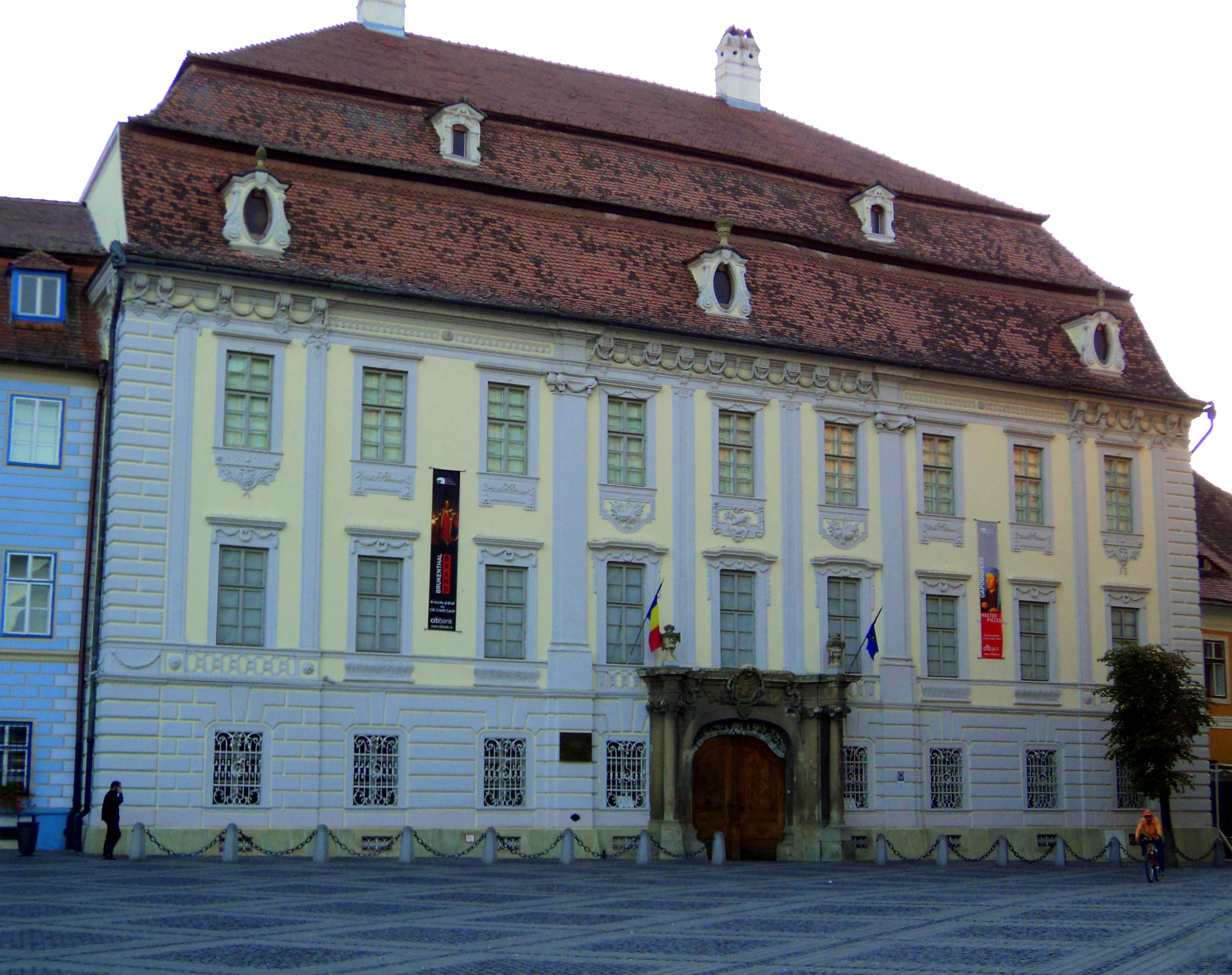 Palatul Brukenthal, azi Muzeul Brukenthal